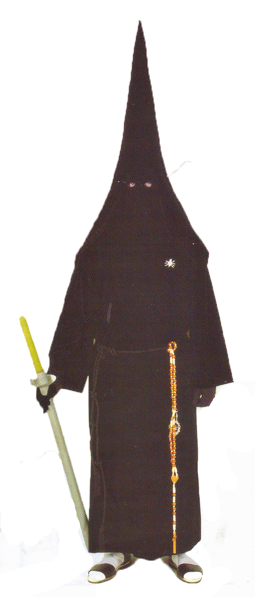 Hábito de la Hermandad de Ntra. Señora de los Dolores de Ocaña (Toledo)